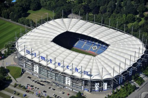 HAMBURG 08.07.2012 Die Imtech Arena ist das Stadion des Fußball-Bundesligisten Hamburger SV in Hamburg, das gelegentlich auch für Konzerte und andere Sportveranstaltungen genutzt wird. Bis Juni 2001 trug es den Namen Volksparkstadion, bis Juli 2007 AOL Arena und bis Juni 2010 HSH Nordbank Arena. // The stadium Imtech Arena is the home ground of German Bundesliga club HSV.